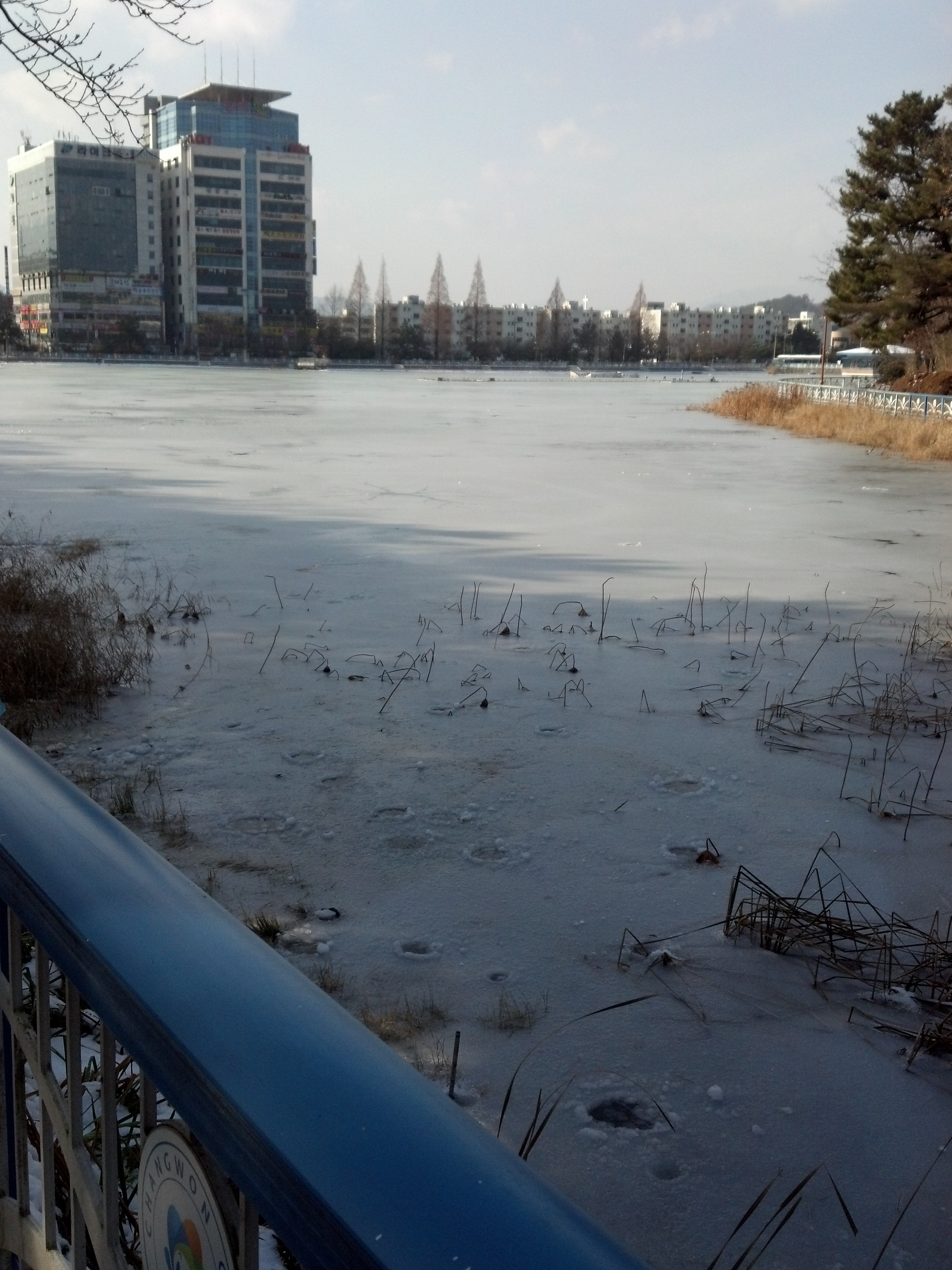 2012년 12월 30일 용지공원